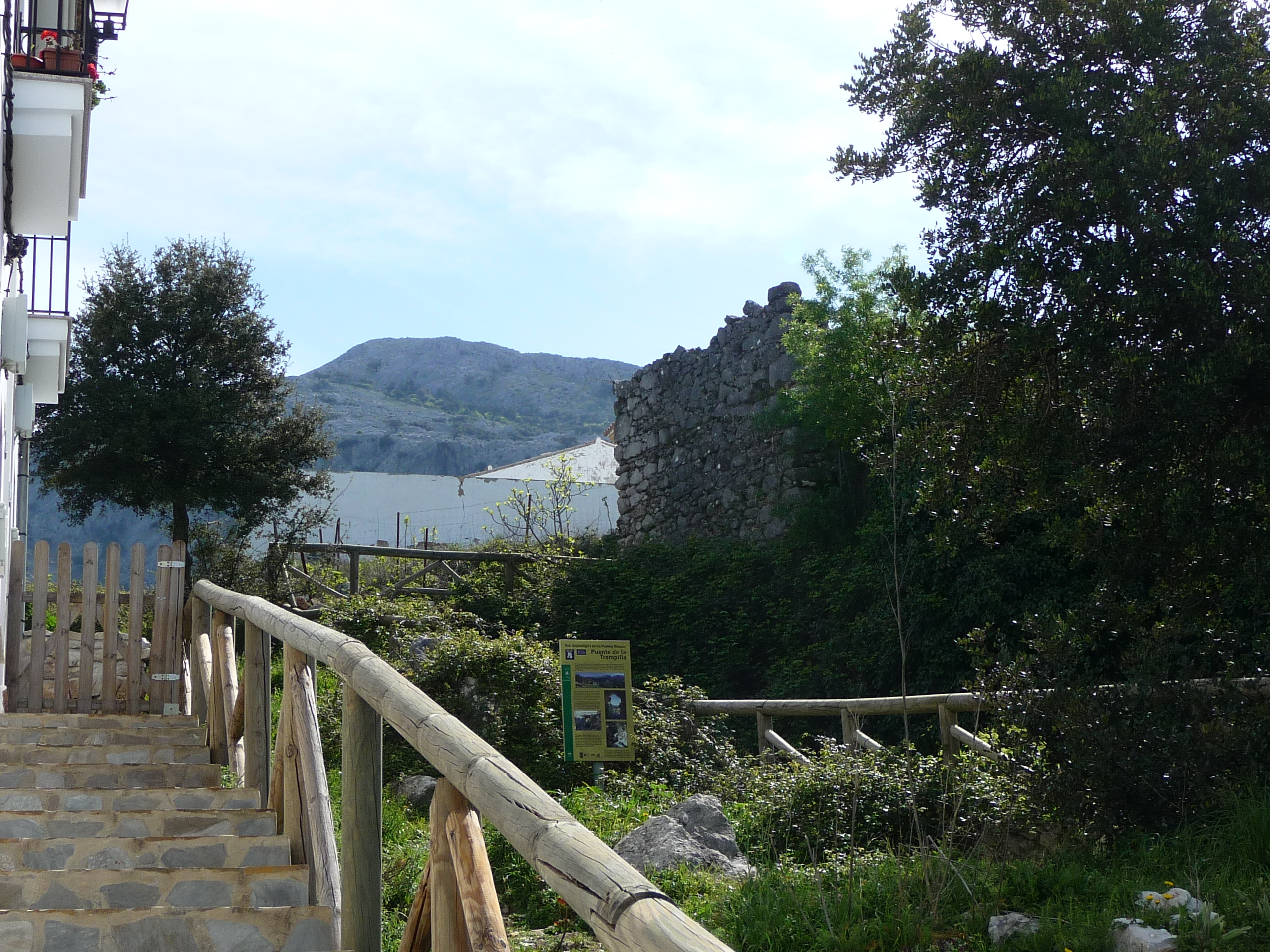 Benaocaz-p1010966.jpg